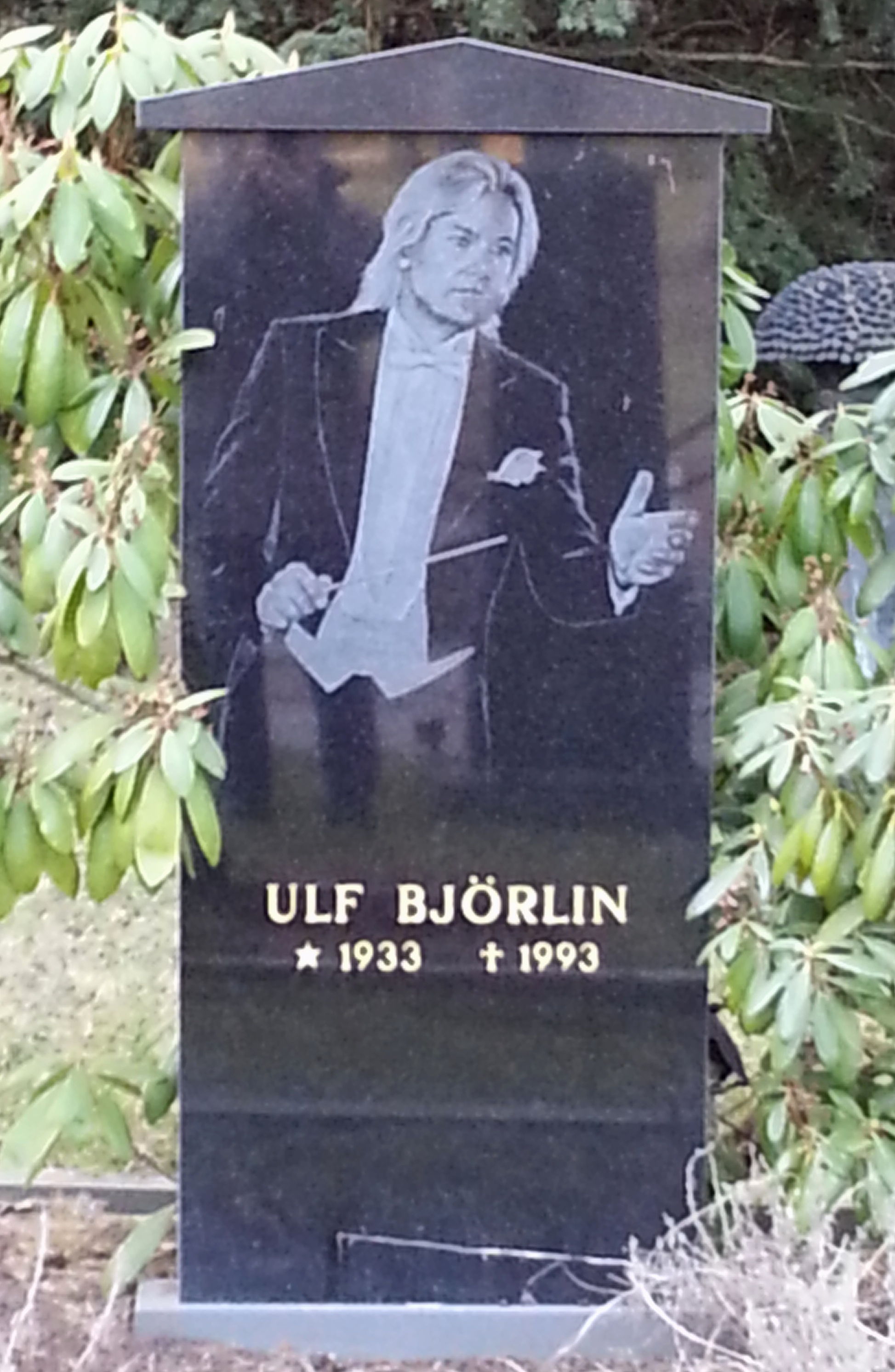 Ulf Björlin porträtterad på sin gravsten